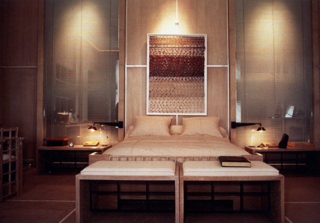 peinture